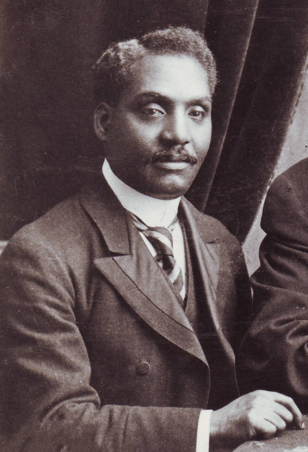 John Alcindor (1873–1924)